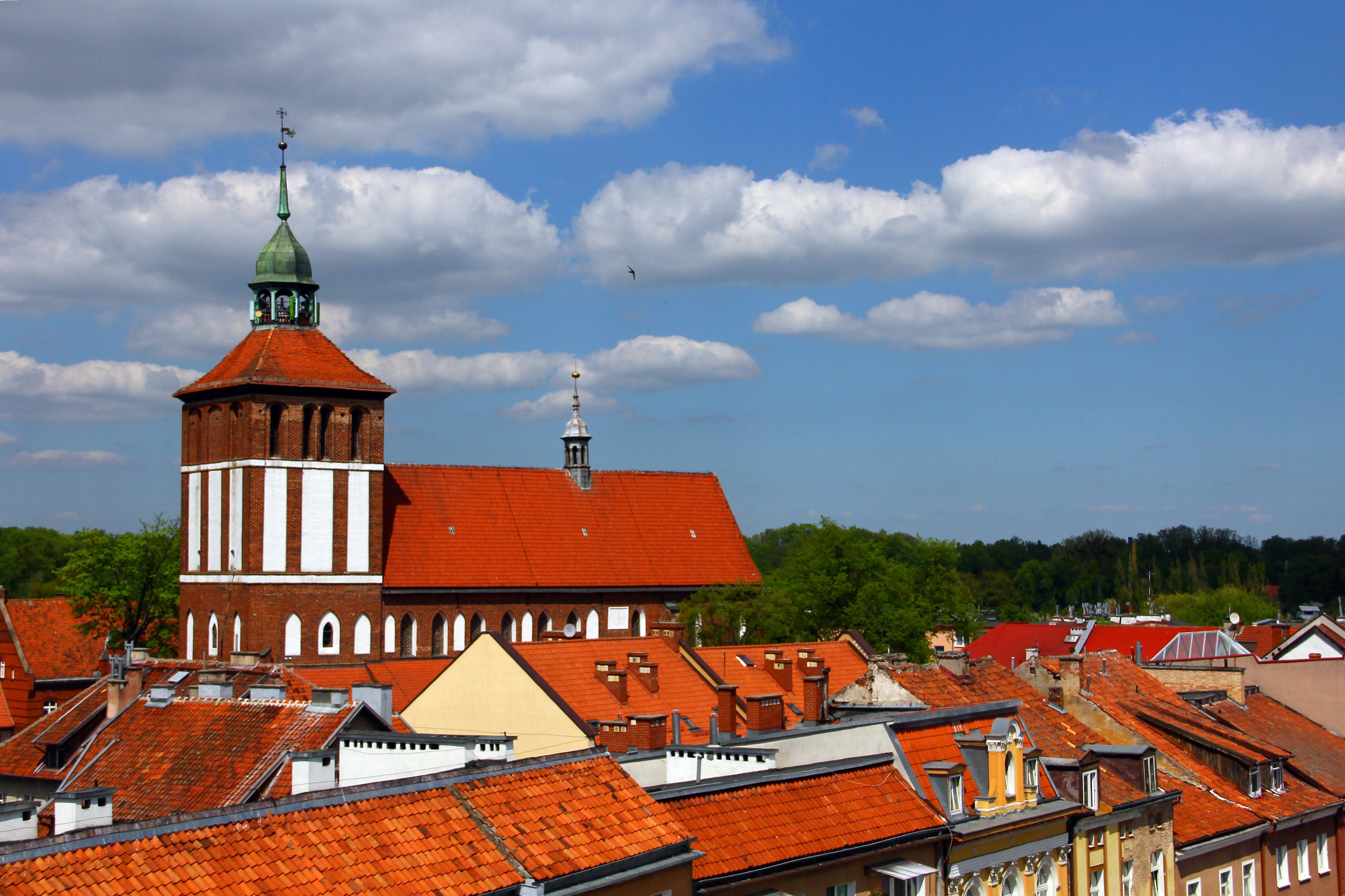 Bartoszyce. Kościół farny św. Jana Ewangelisty i MB Częstochowskiej widziany z Bramy Lidzbarskiej